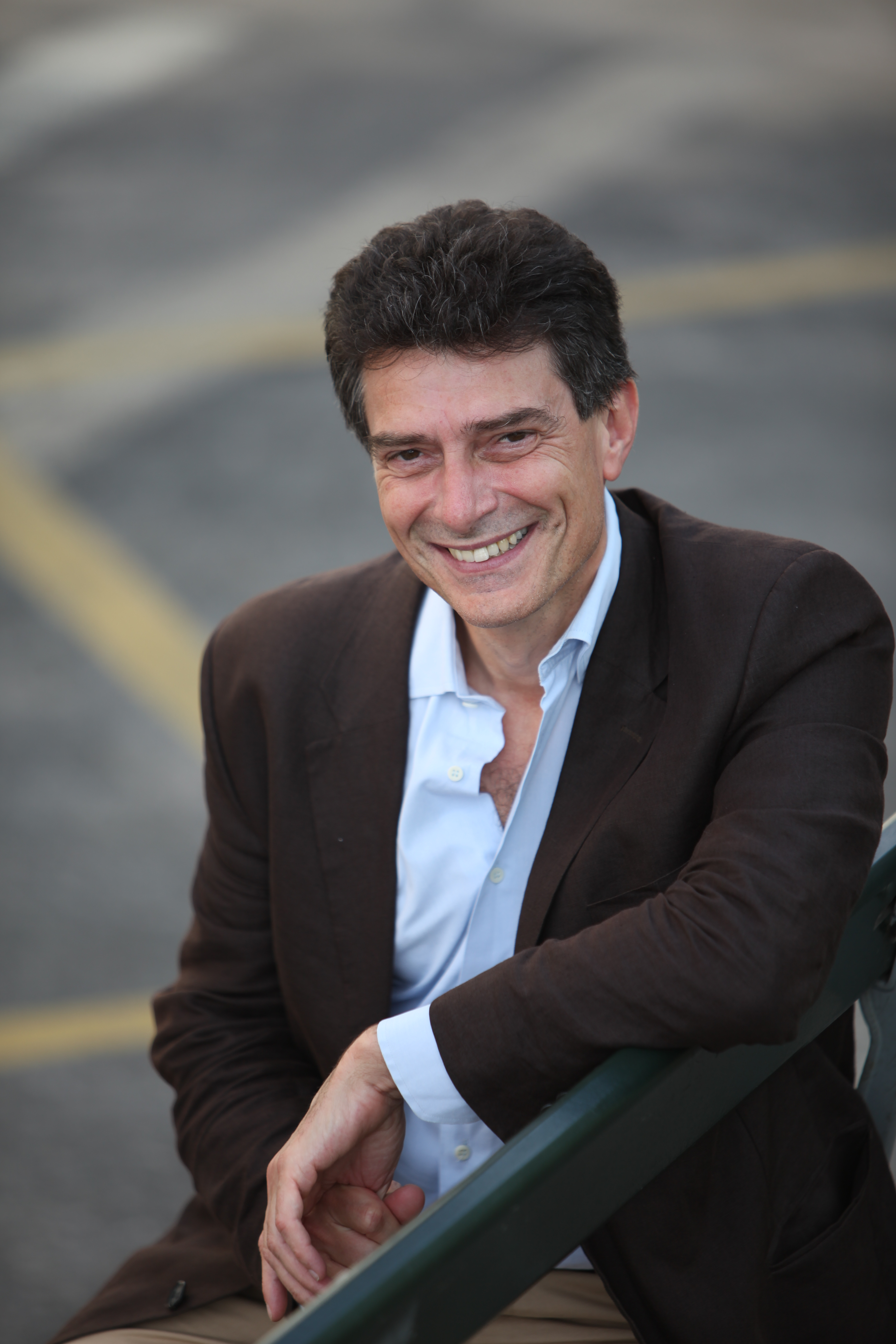 Pascal Durand, Secrétaire national EELV, juin 2012